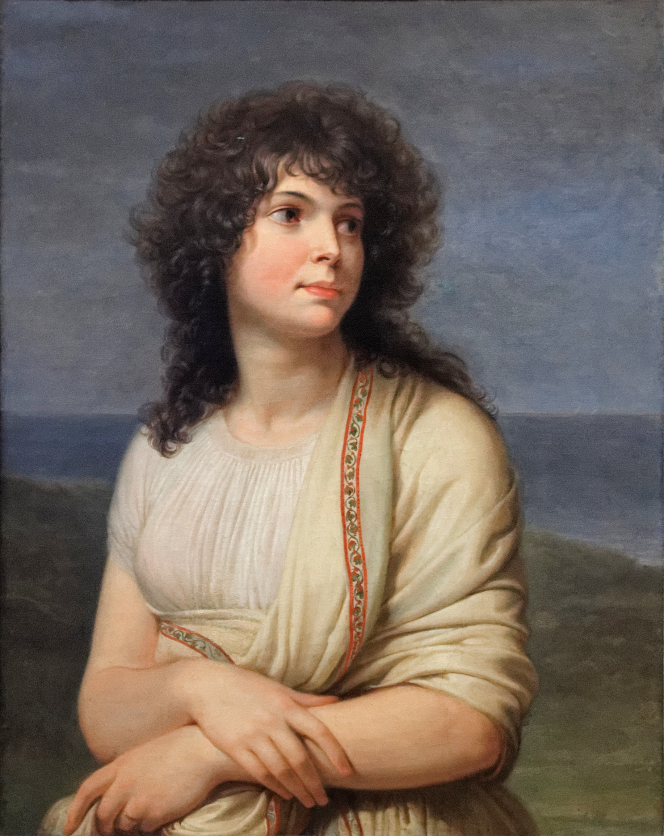 Madame Hamelin, née Jeanne Geneviève Fortunée Lormier-Lagrave (1776-1851). Mariée en 1792 à un fournisseur général aux armées, elle se fit connaître pour sa beauté, son originalité et ses liaisons célèbres, notamment avec Bonaparte. Figure de premier plan dans le petit monde des merveilleuses, elle lança les robes « à la sauvage » et la couleur « cuisse de nymphe émue ».Appiabi, le plus célèbre des peintres néoclassiques italiens, fit son portrait alors qu'elle résidait à Milan, pendant les campagnes de Bonaparte.